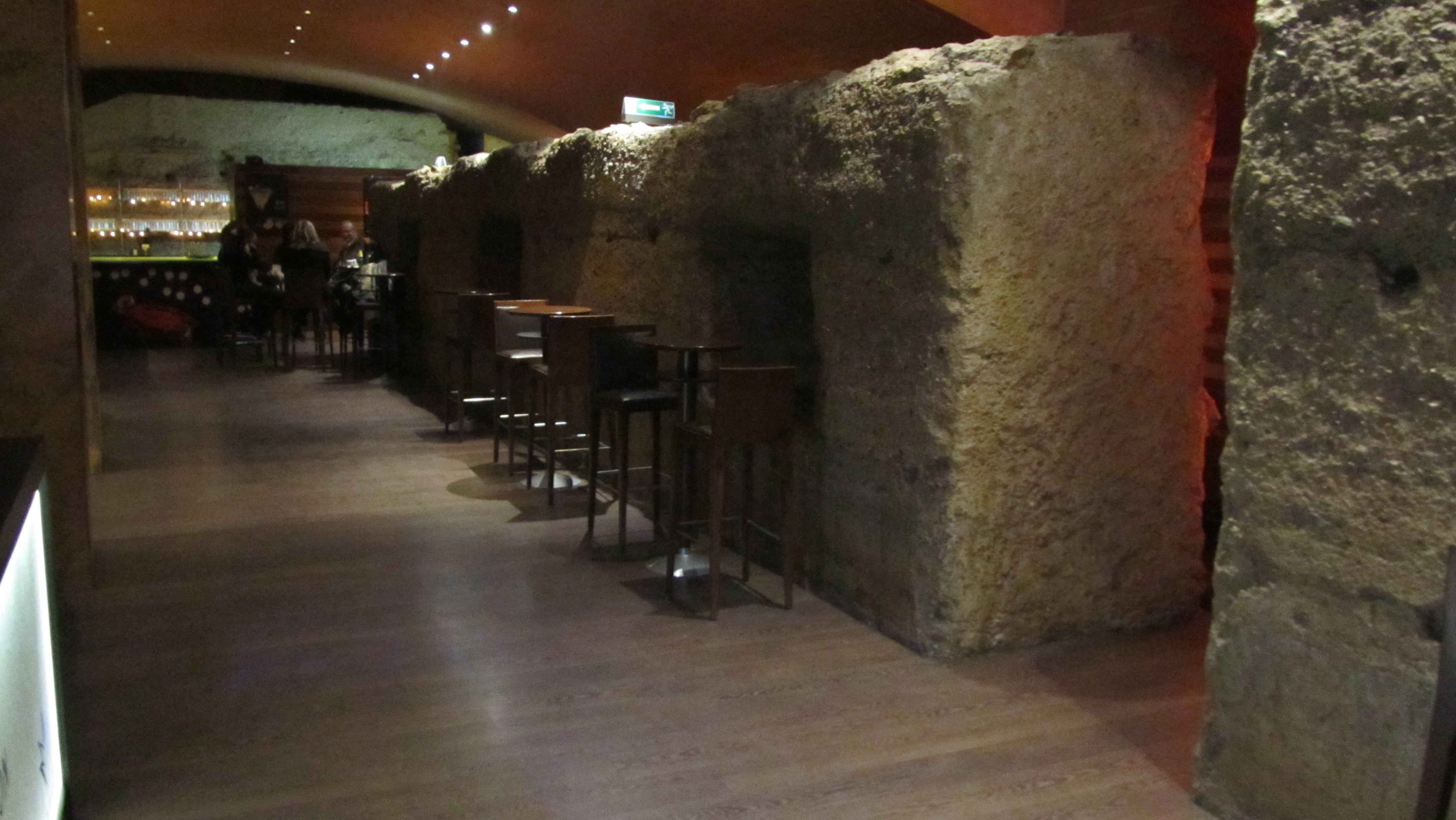 Imagen de la muralla árabe de Murcia (España), realizada en el siglo XII. El tramo corresponde al que se conserva en la cafetería denominada "La Muralla".